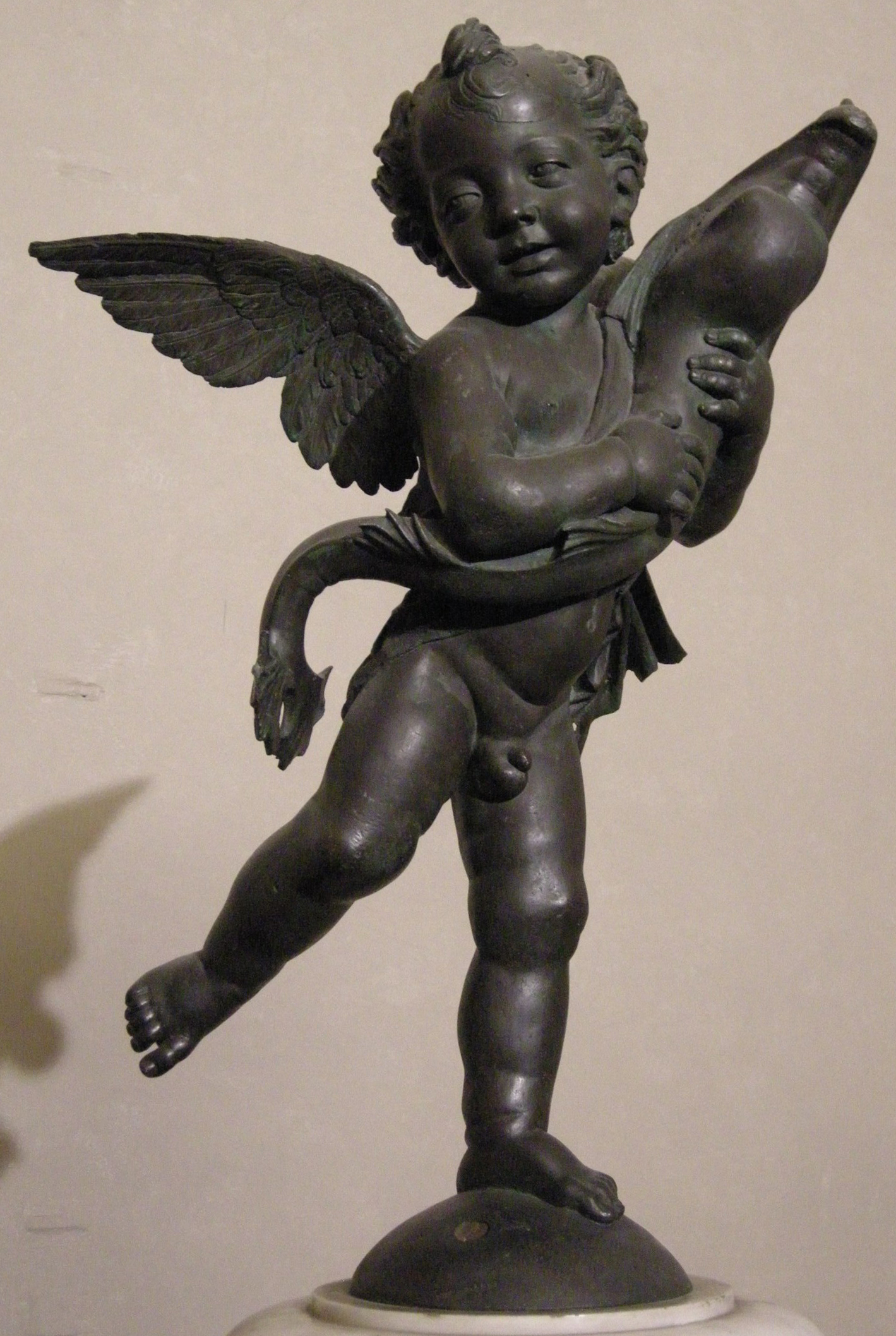 Putto col delfino di verrocchio